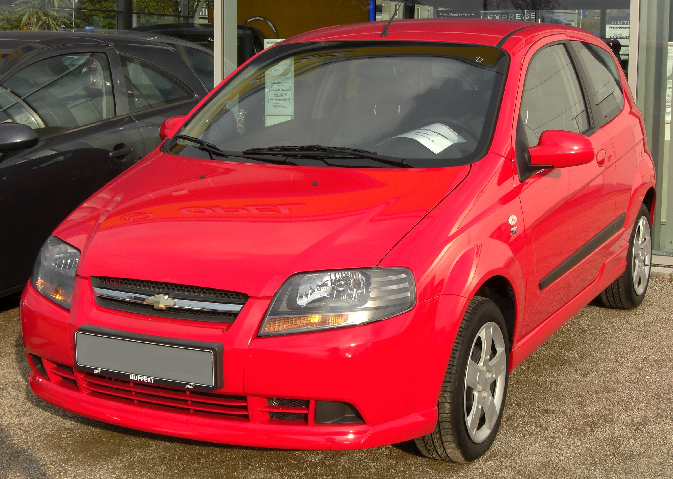 Chevrolet Kalos 3-Türer Facelift